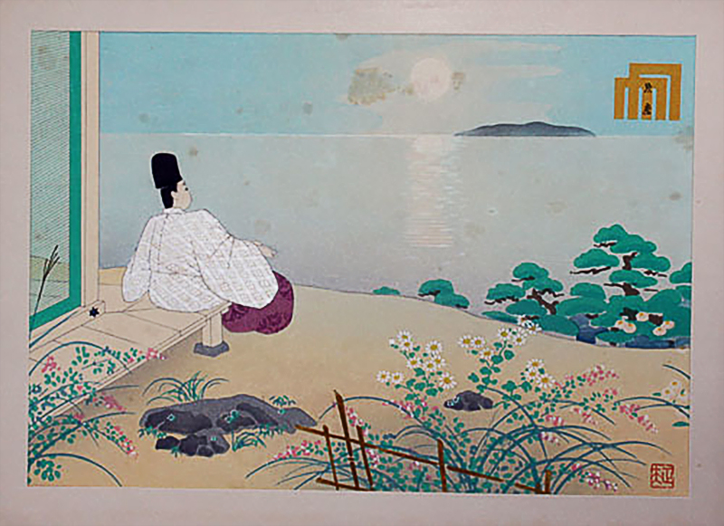 Genji at Suma from Genji Monogatari